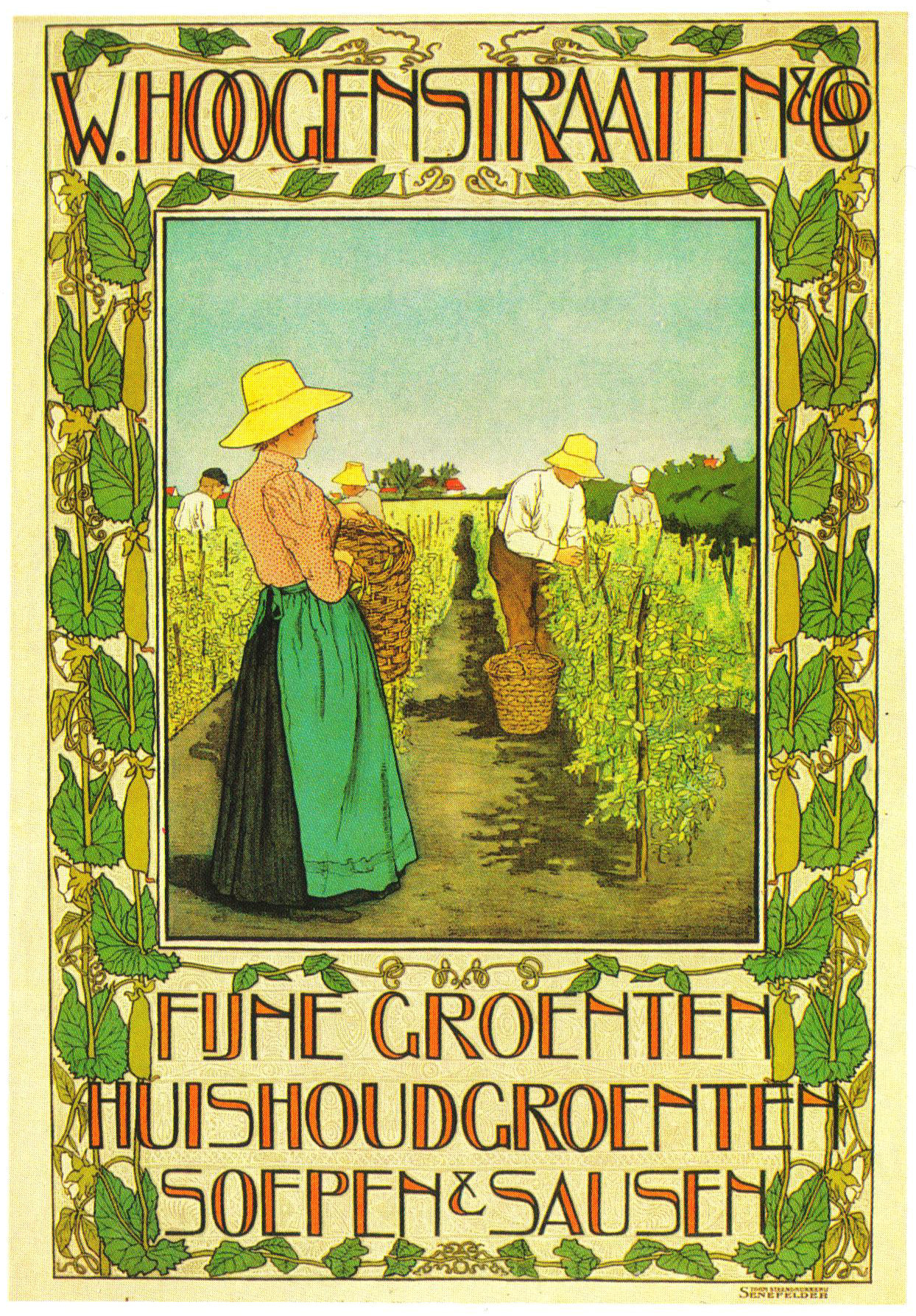 Affiche. "W. Hoogstraaten & Co. Fijne groenten, Huishoudgroenten Soepen en Sausen".